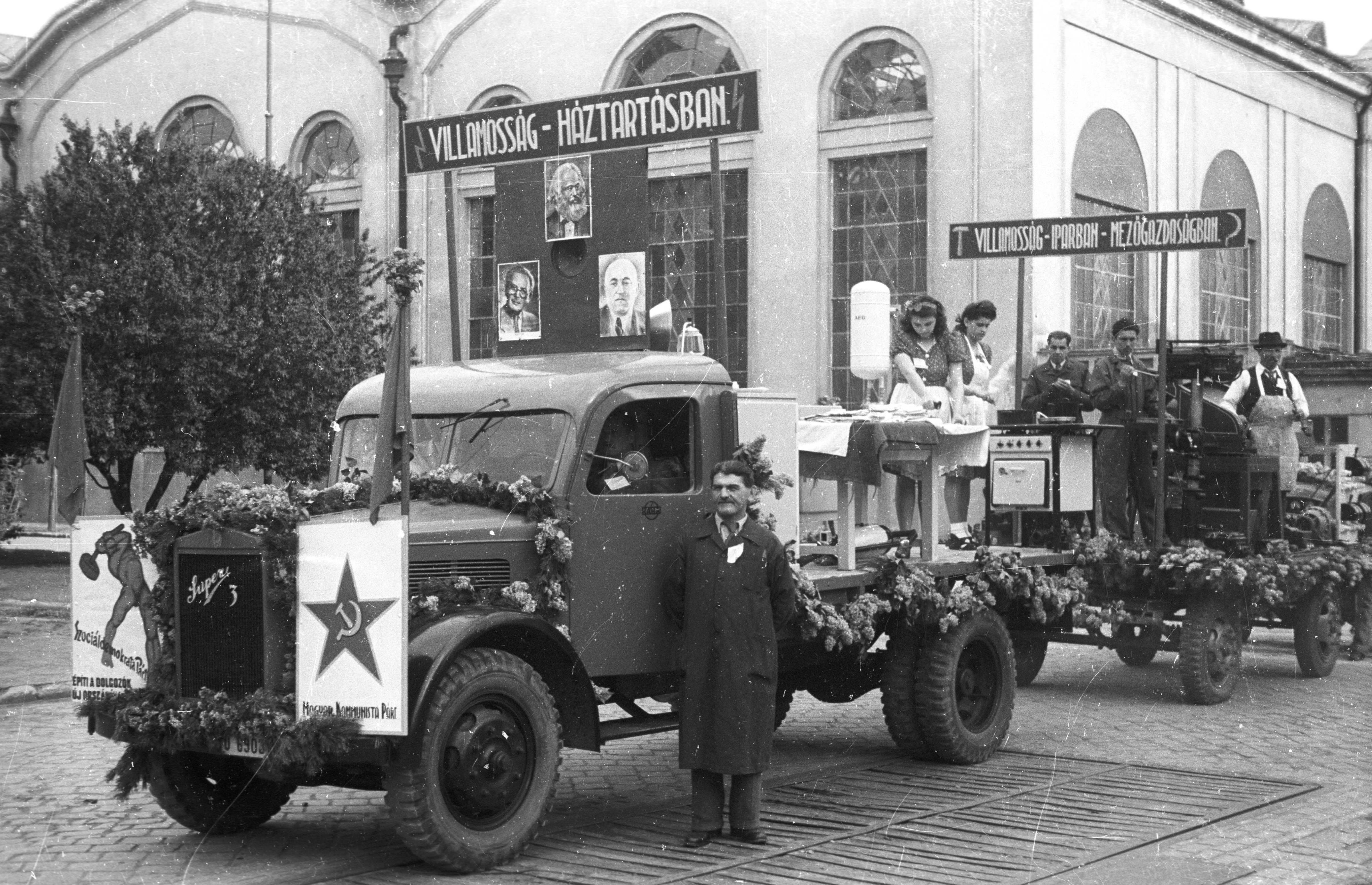 Gyárváros, ipartelep, május 1-i felvonulás. Location: Hungary, Győr Tags: commercial vehicle, kitchen, furniture, fireplace, heavzy industry, street view, vacuum cleaner, 1st of May parade, Rába-brand, Hungarian brand, Red Star Title: Gyárváros, ipartelep, május 1-i felvonulás.